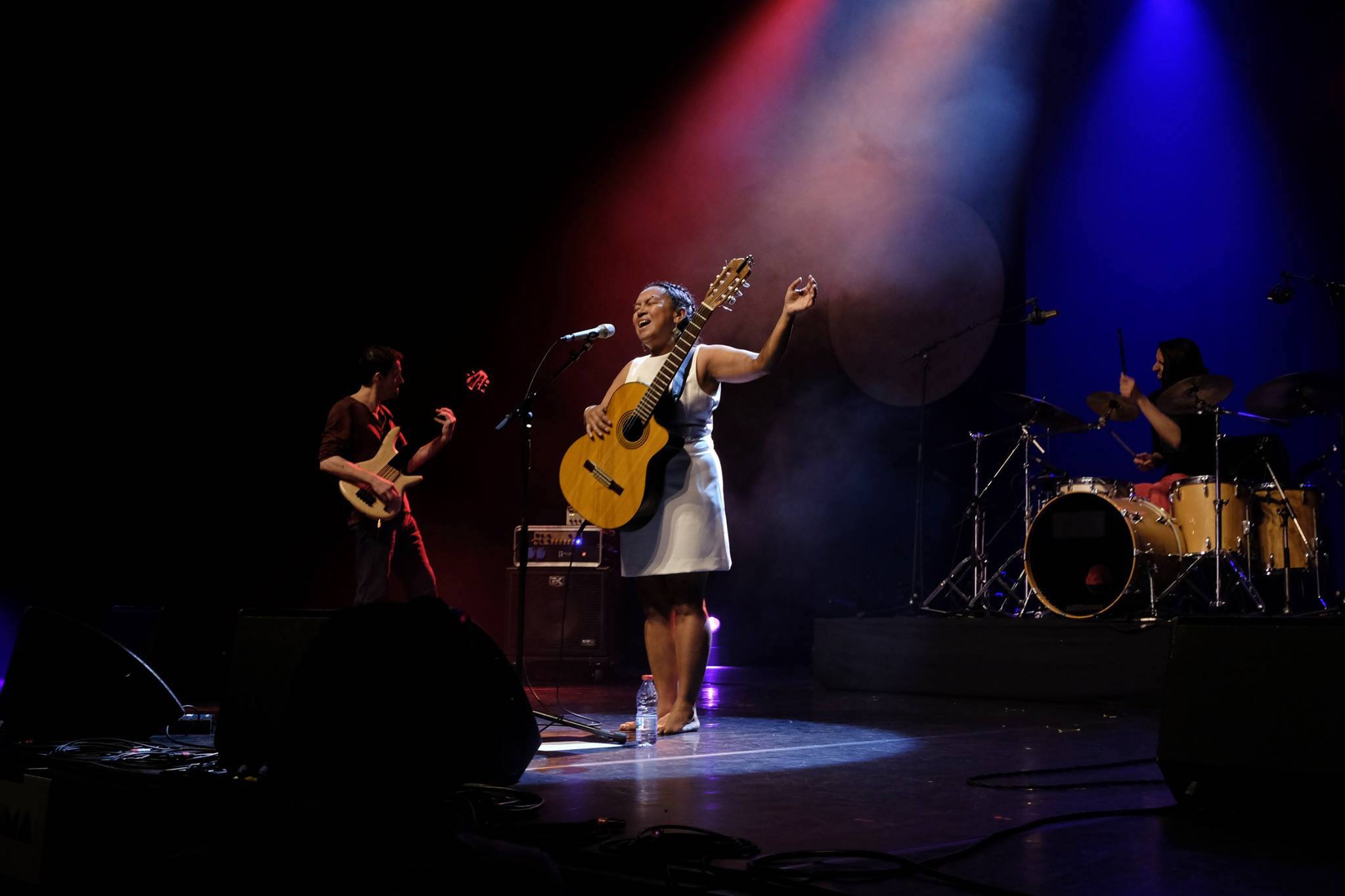 Scène Sacem Internationale 2015 IOMMA, Ile de la Réunion (2015)